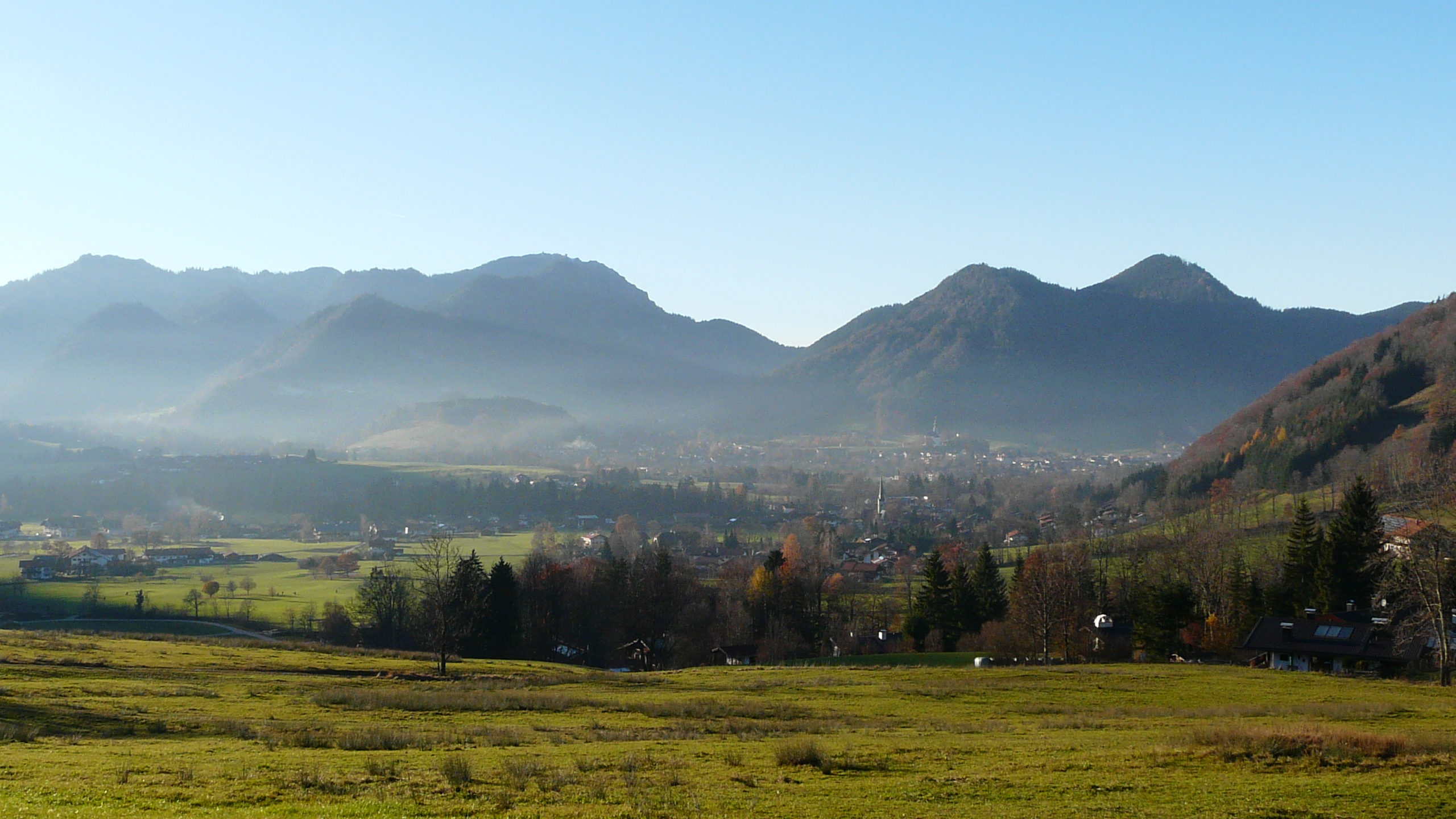 Ruhpolding von Südosten